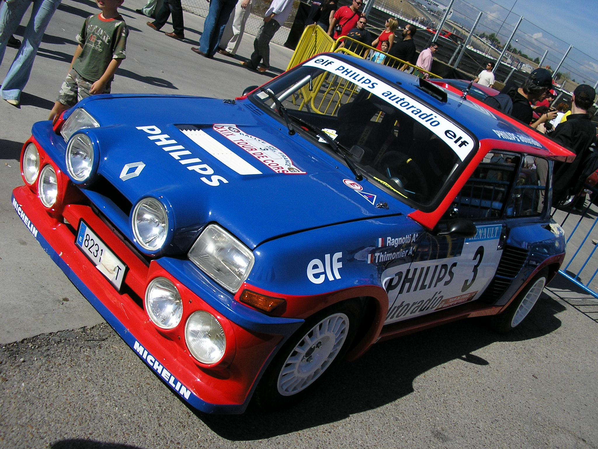 Renault 5 Maxiturbo shown in Circuito del Jarama (Madrid). Jornada de puertas abiertas 2006.